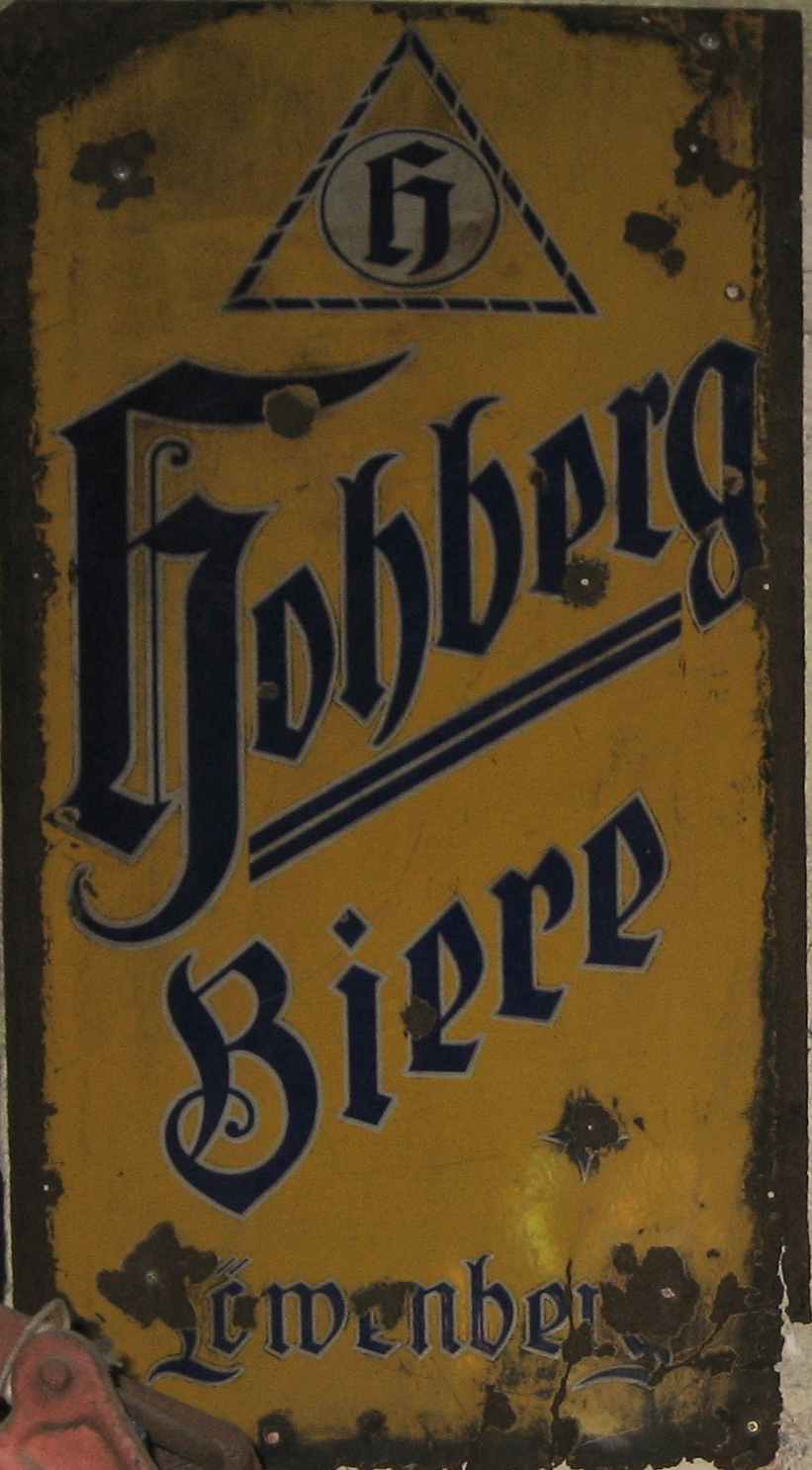 J. Hohberg Brauerei - reklama browaru z Lwówka Śląskiego